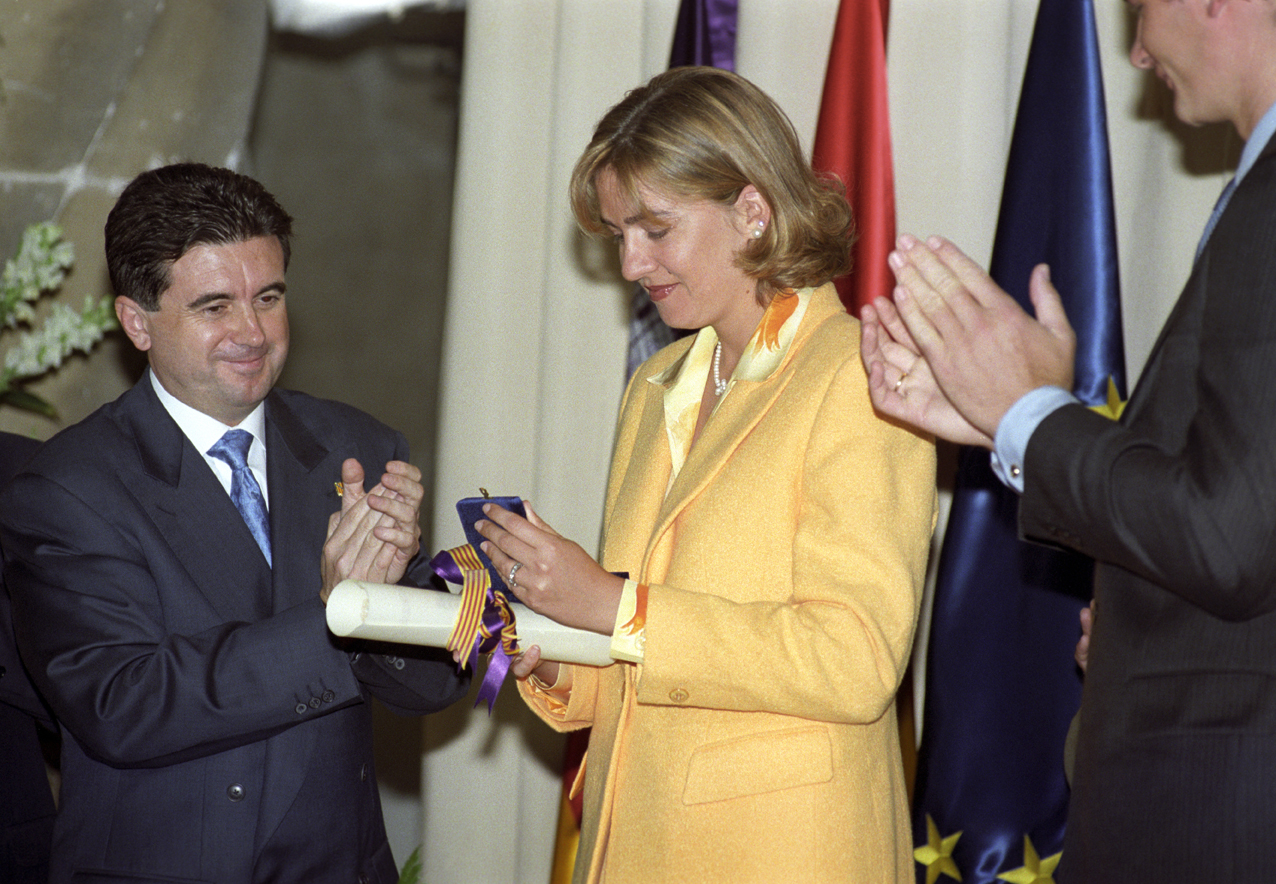 Moment en que els ducs de Palma reben la Medalla d’Or de la Comunitat Autònoma de les Illes Balears de mans del president Jaume Matas.